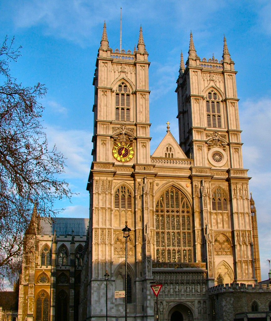 Fachada oeste de la Catedral de Westminster.